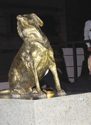 Estatua de Bronce de Gonzalo, mascota del Museo de Arte Sacro de la Fundación Nicolás Darío Latourrette Bo, realizada por el escultor Gustavo Beckelmann